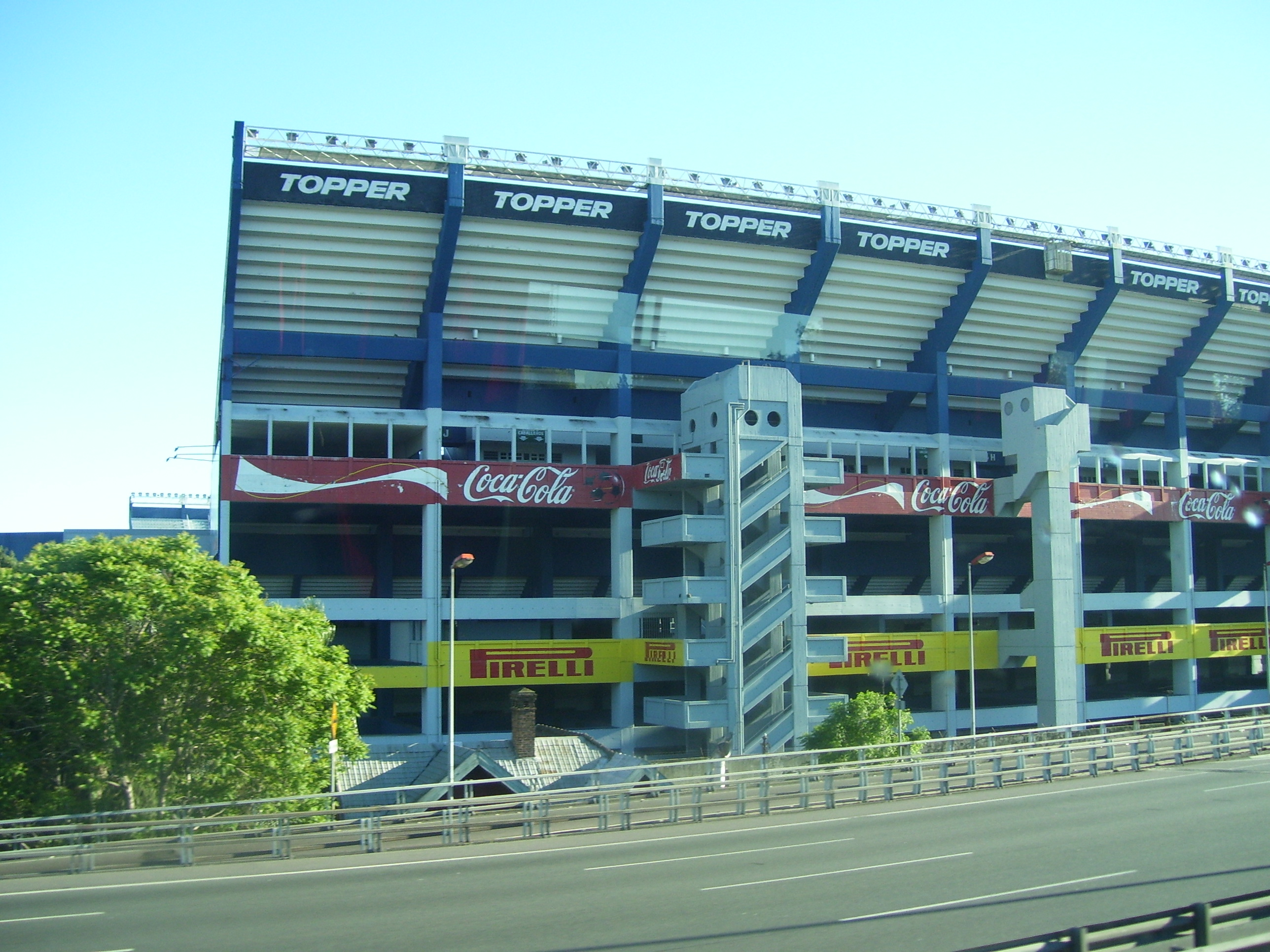 Cancha de Velez